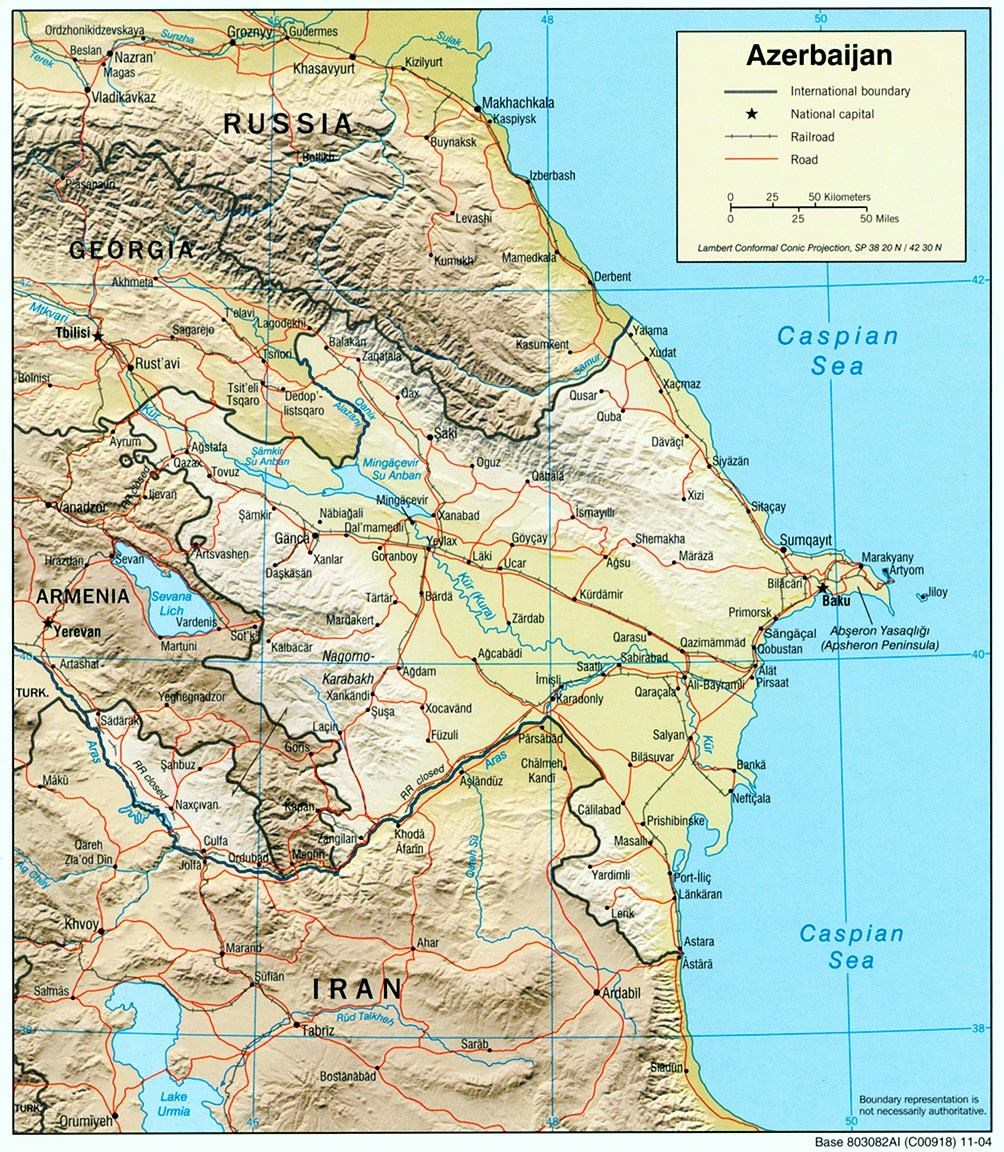 Azerbaijan (Shaded Relief) 2004